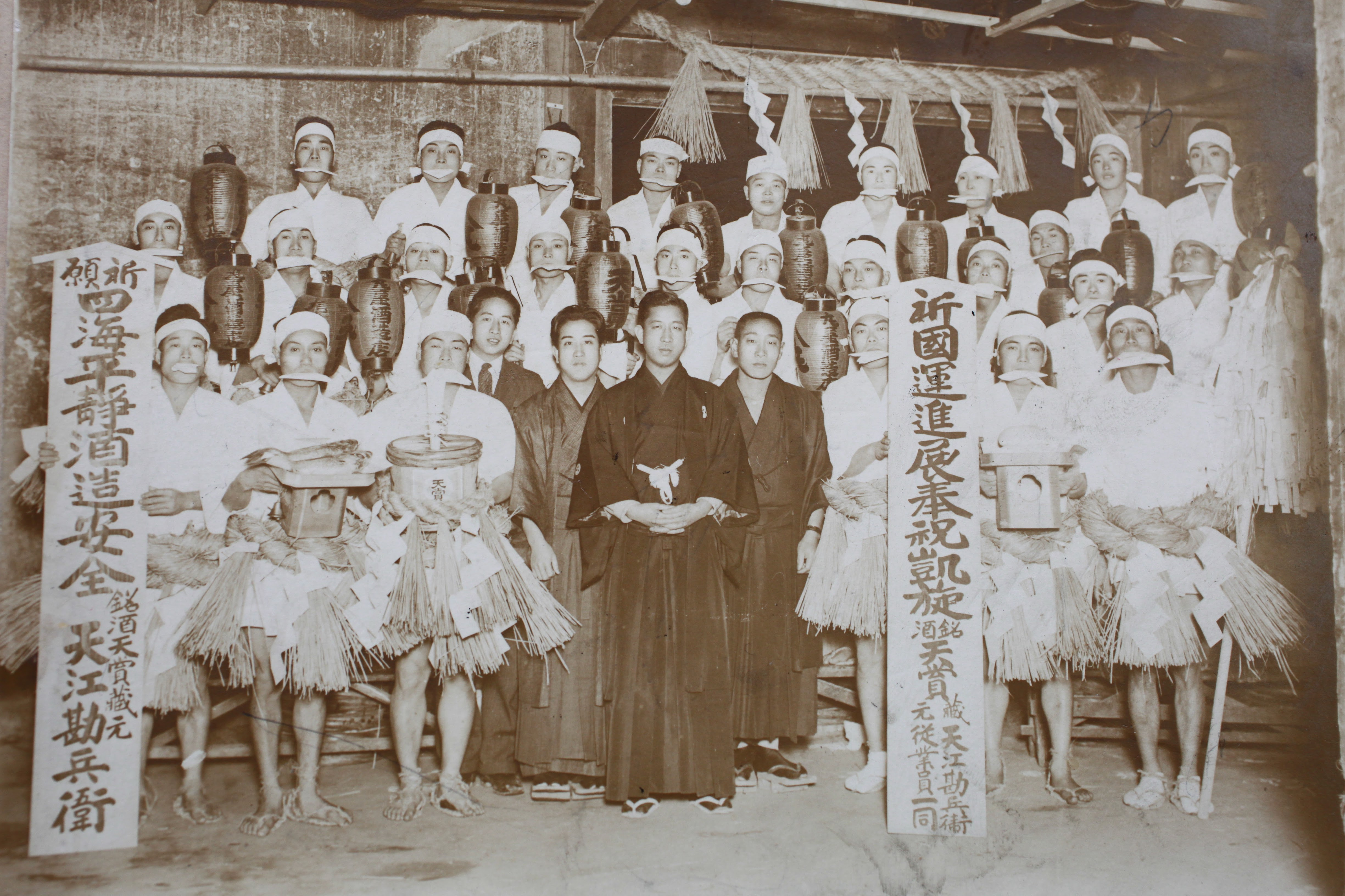 仙台の天賞酒造の裸参り 昭和16年（1941）